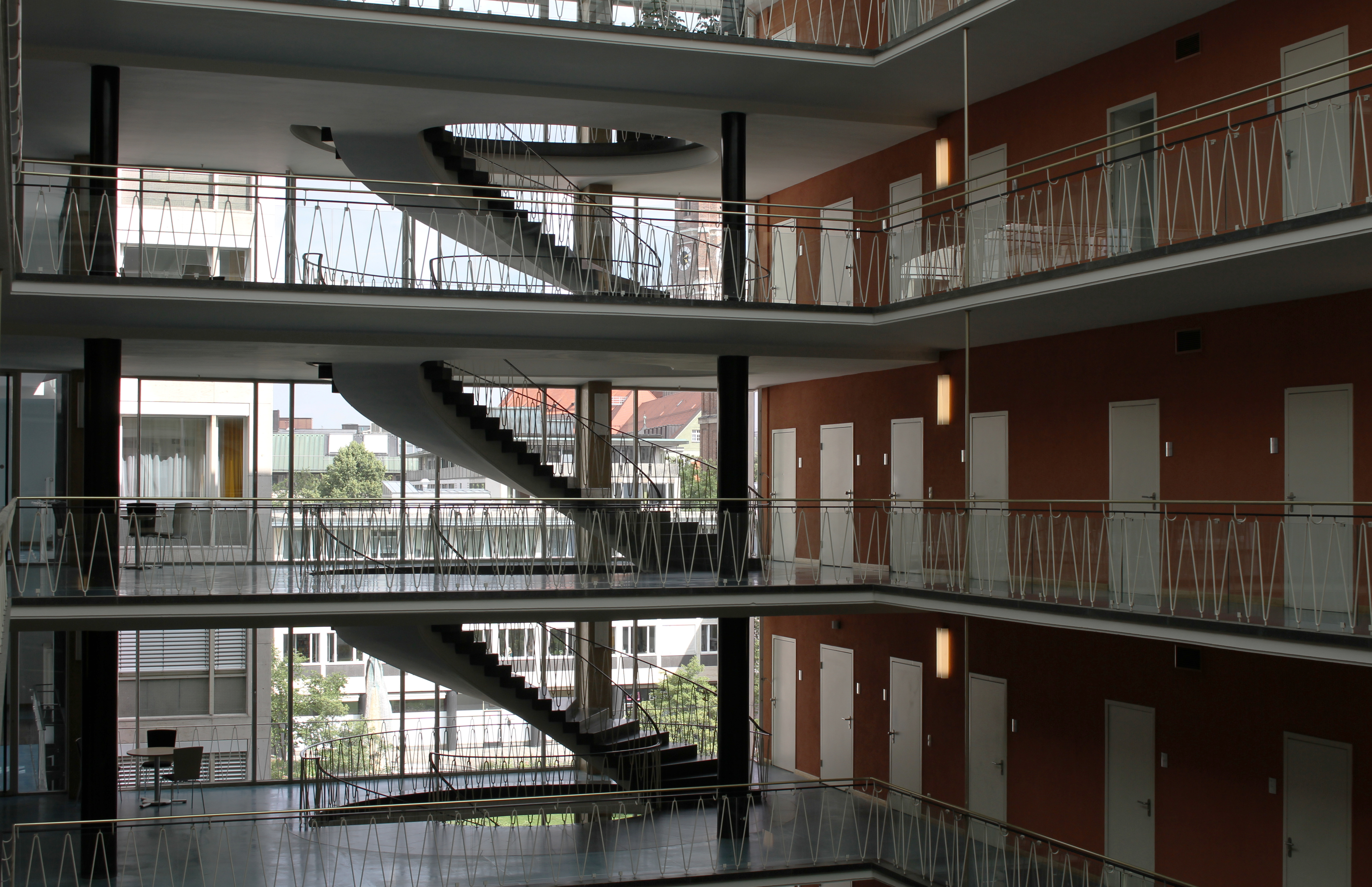 Neue Maxburg, Innenraum mit Treppenanlage von Architekt Sep Ruf